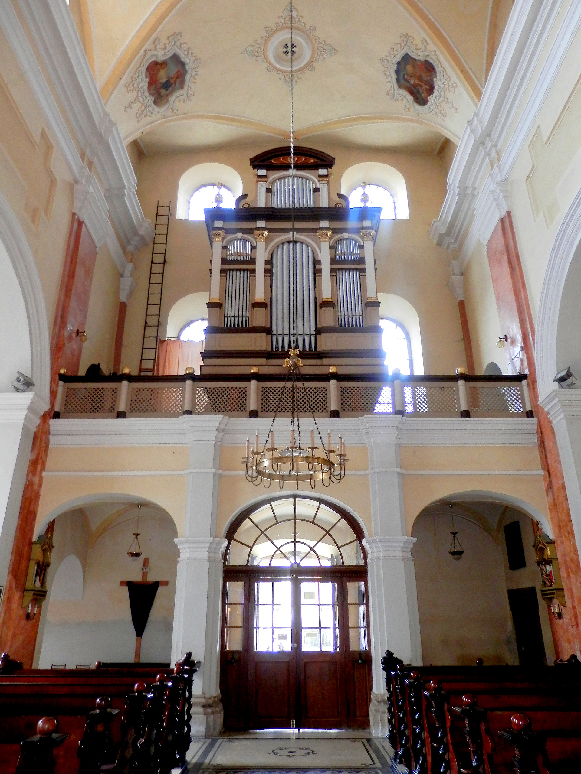 Streda 23.3.2016, kostol svätého Jozefa (Františkáni), veľkonočná výzdoba interiéru. Mesto Prešov.